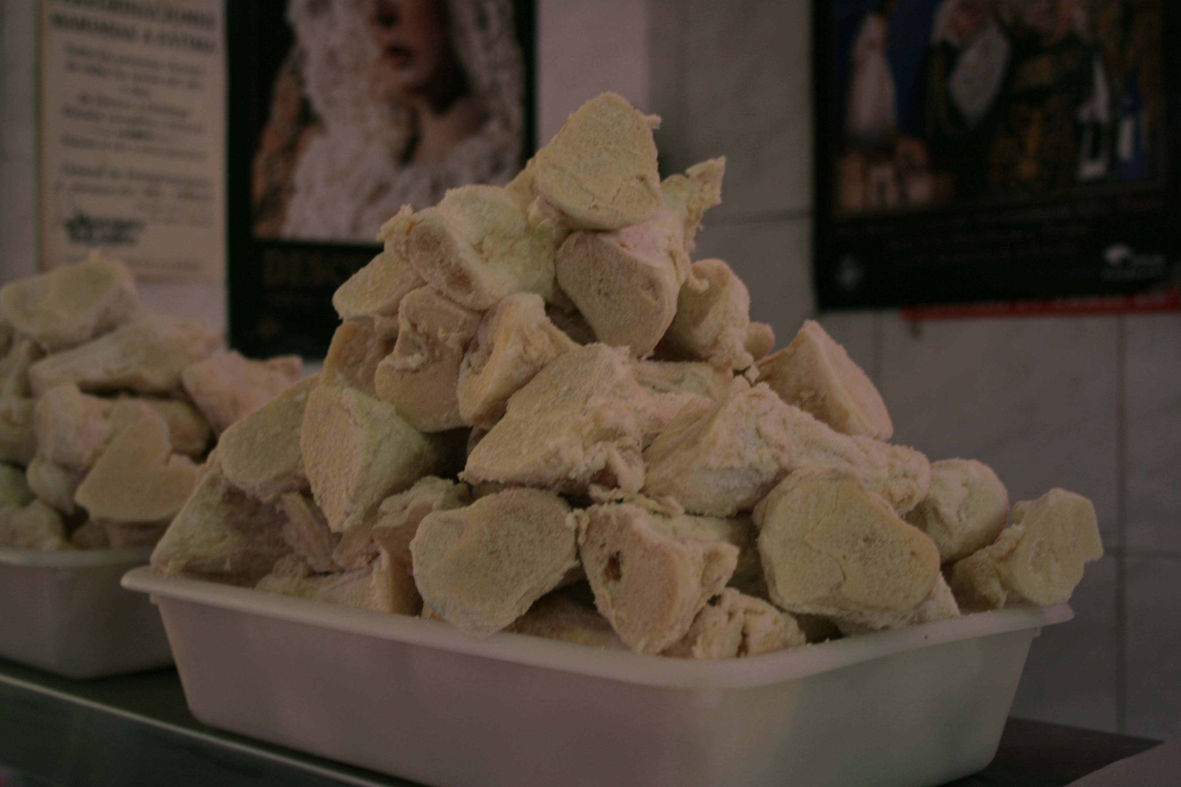 Huesos en Salazón - Málaga - (Olla de San Antón)